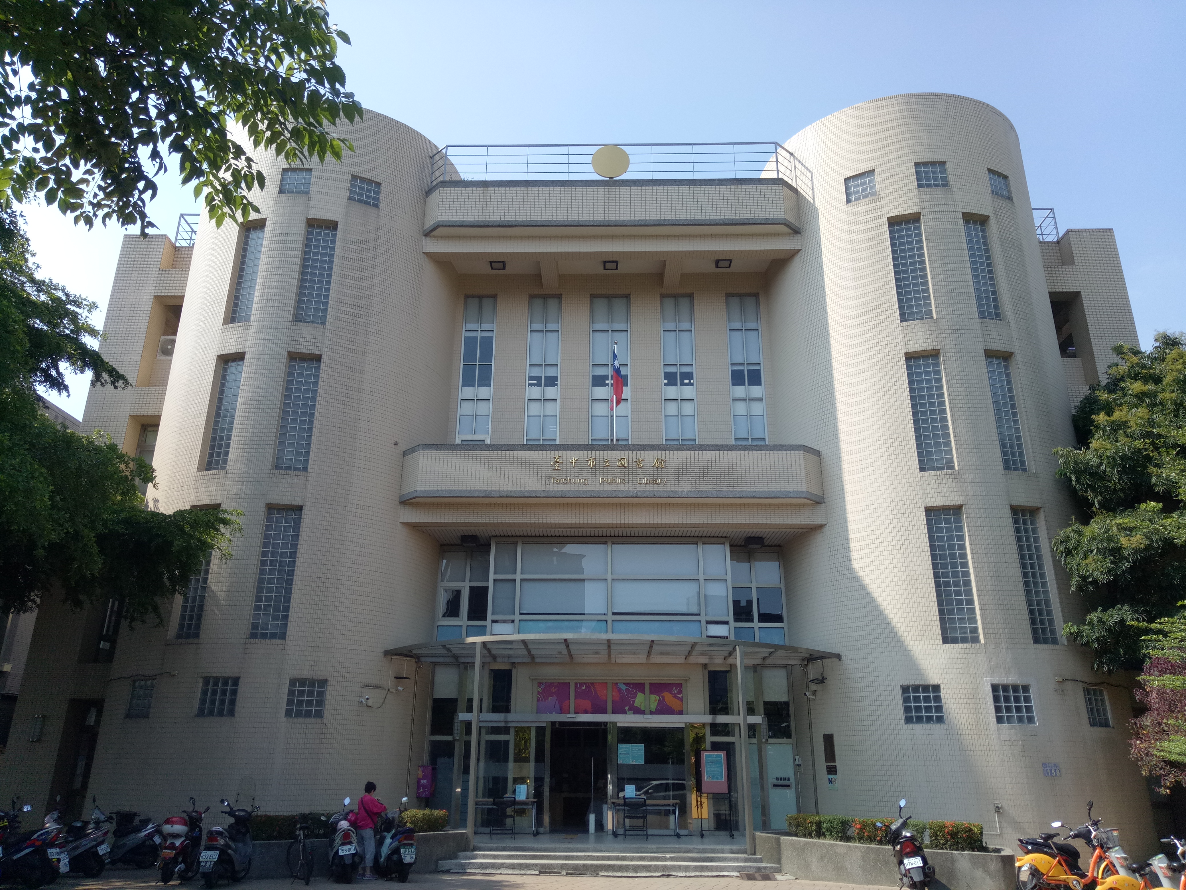 臺中市立圖書館北屯四張犁分館，原稱臺中市北屯區四張犁圖書館，現兼為臺中市立圖書館總館，是位於中華民國臺中市北屯區的一座市立公共圖書館，由臺中市立圖書館管轄。